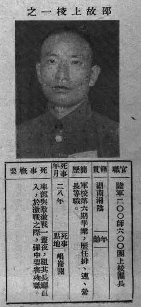 抗戰軍人忠烈錄第一輯中的烈士遺像